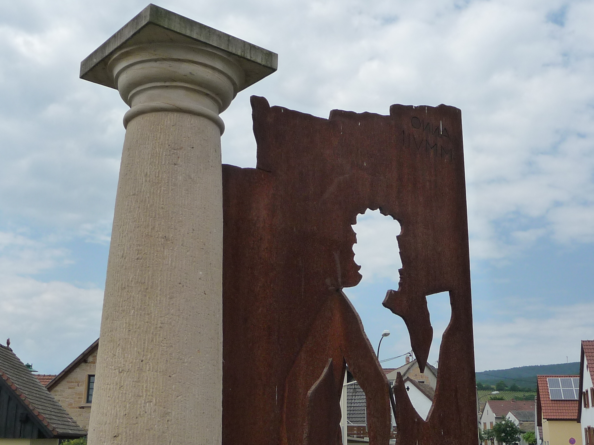 Verkehrskreisel in Ungstein, Stadtteil von Bad Dürkheim, Rheinland-Pfalz